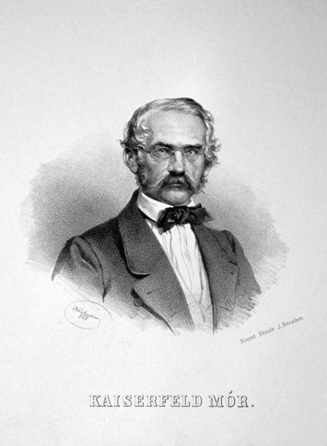 Moritz von Kaiserfeld (1811-1885), Landeshauptmann der Steiermark, lebenslänglisches Mitglied des Herrenhauses. Lithographie von Joseph Kriehuber, 1865